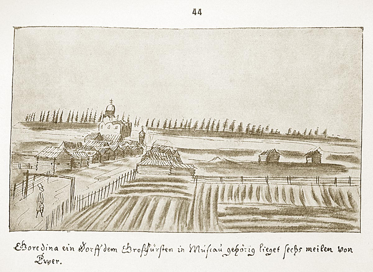 Городня